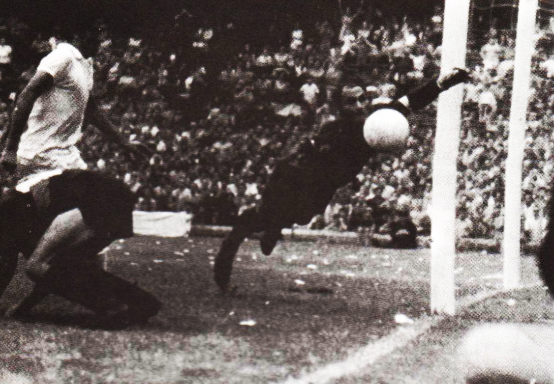 Edgardo Norberto Andrada en un partido contra Boca Juniors.